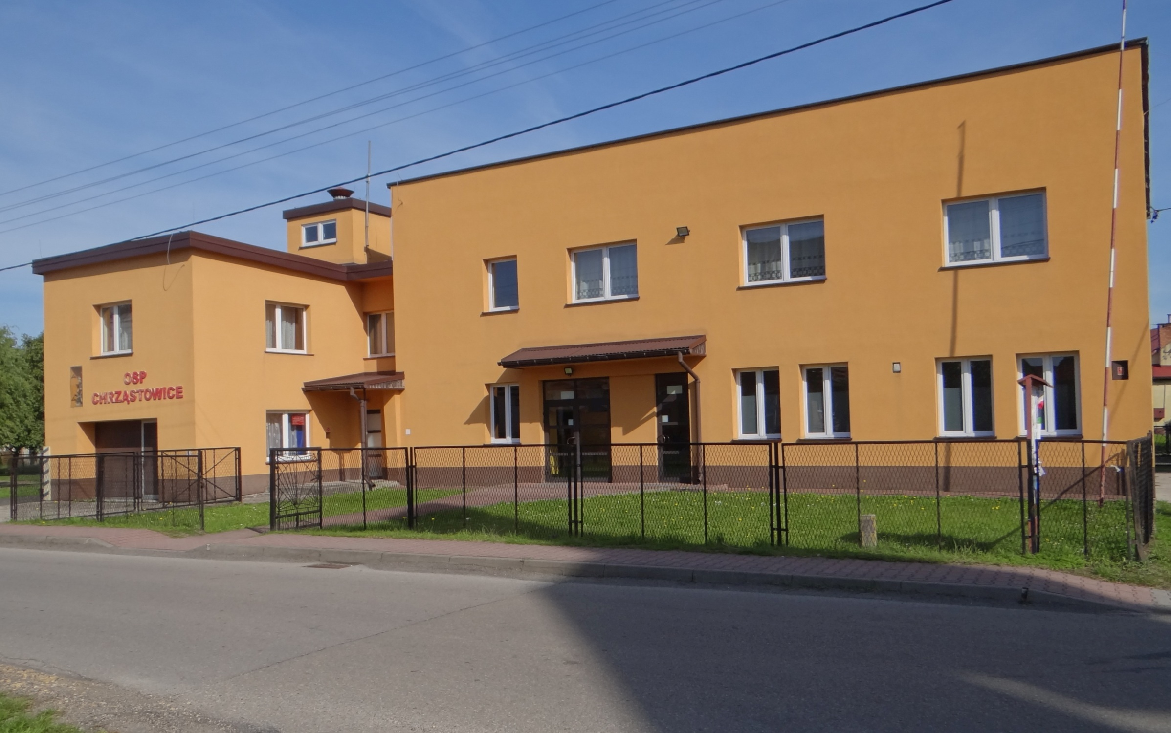 Chrząstowice, powiat wadowicki